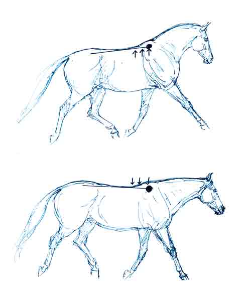 Druckpunkt des Sattels auf Rücken und Widerrist